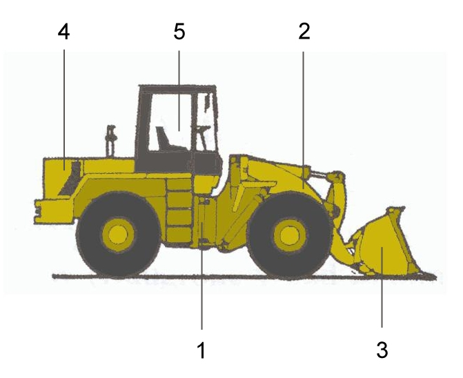 Schematische Darstellung eines Radladers: 1. Knickgelenk 2. Hubrahmen mit Z-Kinematik 3. Anbaugerät vorne (Ladeschaufel) 4. Motor 5. Fahrerkabine